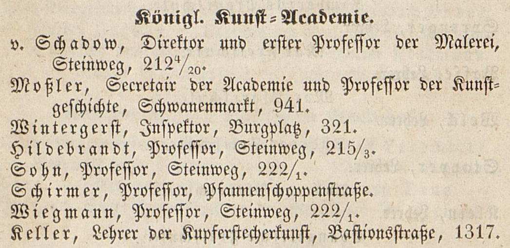 Königliche Kunstakademie - Direktor, Professoren, Lehrer 1843 in Adreßbuch für den Regierungsbezirk Düsseldorf 1842/1843, S. 16